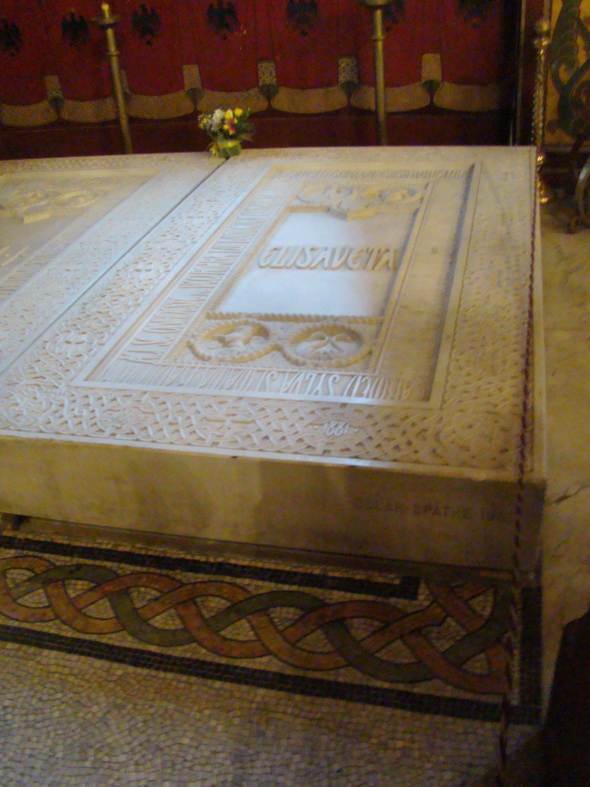 Biserica Episcopală "Adormirea Maicii Domnului", mormântul reginei Elisabeta a României 01